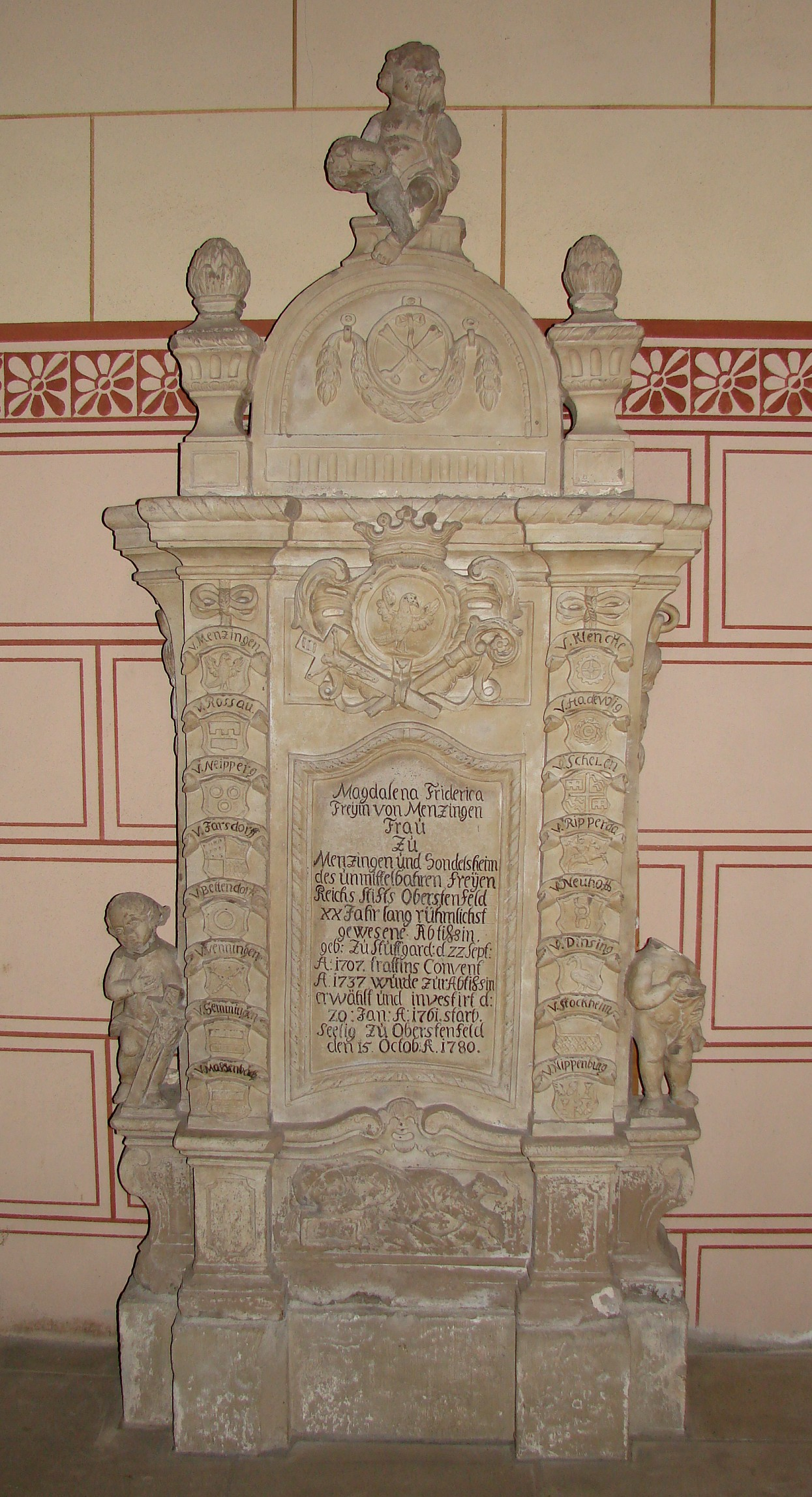 Stiftskirche Oberstenfeld, Epitaph Magdalena Friderica Freiin von Mentzingen (1707-1780), Äbtissin des Reichsstifts Oberstenfeld, mit Wappen Mentzingen und Ahnenwappen: (optisch) links: Mentzingen Rossau Neipperg Farsdorff Bettendorff Venningen Gemmingen Massenbach (optisch) rechts: Klenke Hadewig Schelen Ripperda Neuhoff Dinsing Stockheim Nippenburg